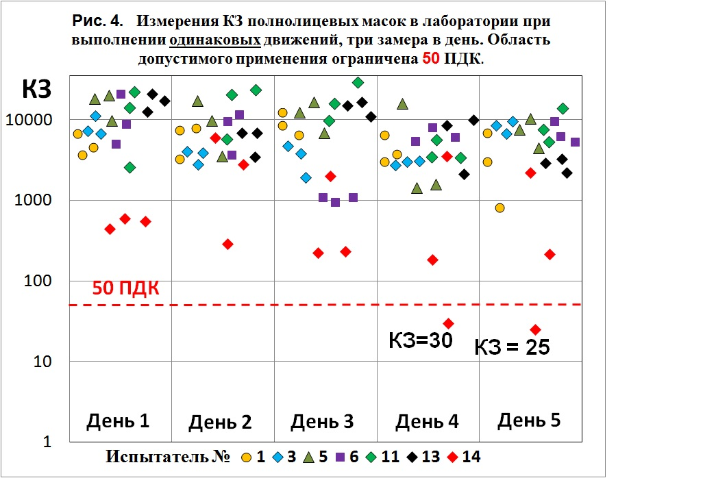 Иллюстрация к статье Респиратор, показывающая как непосотянны защитные свойства одного и того же СИЗОД при его носке одним и тем же рабочим